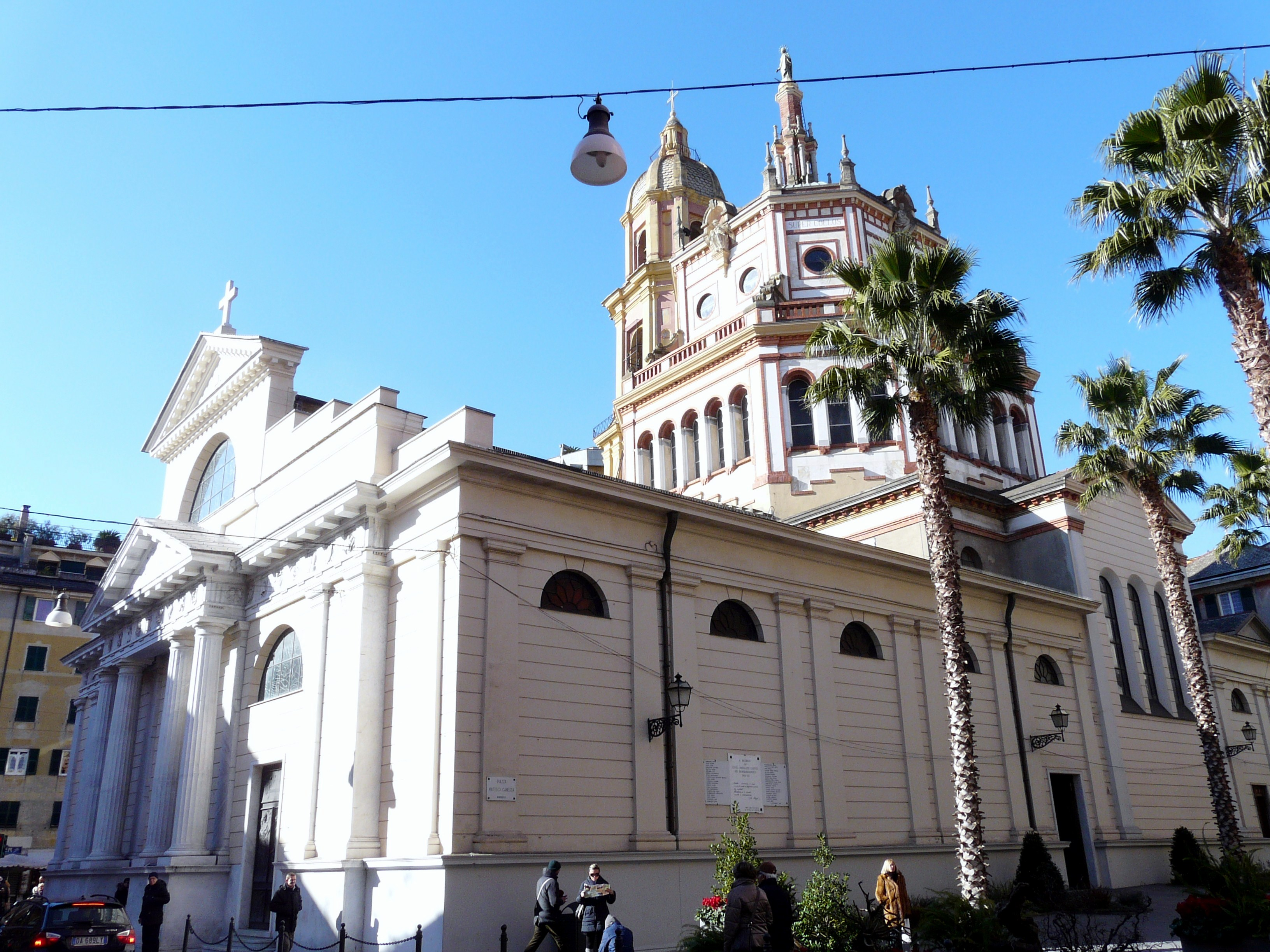 Vista laterale della basilica dei Santi Gervasio e Protasio di Rapallo, Liguria, Italia